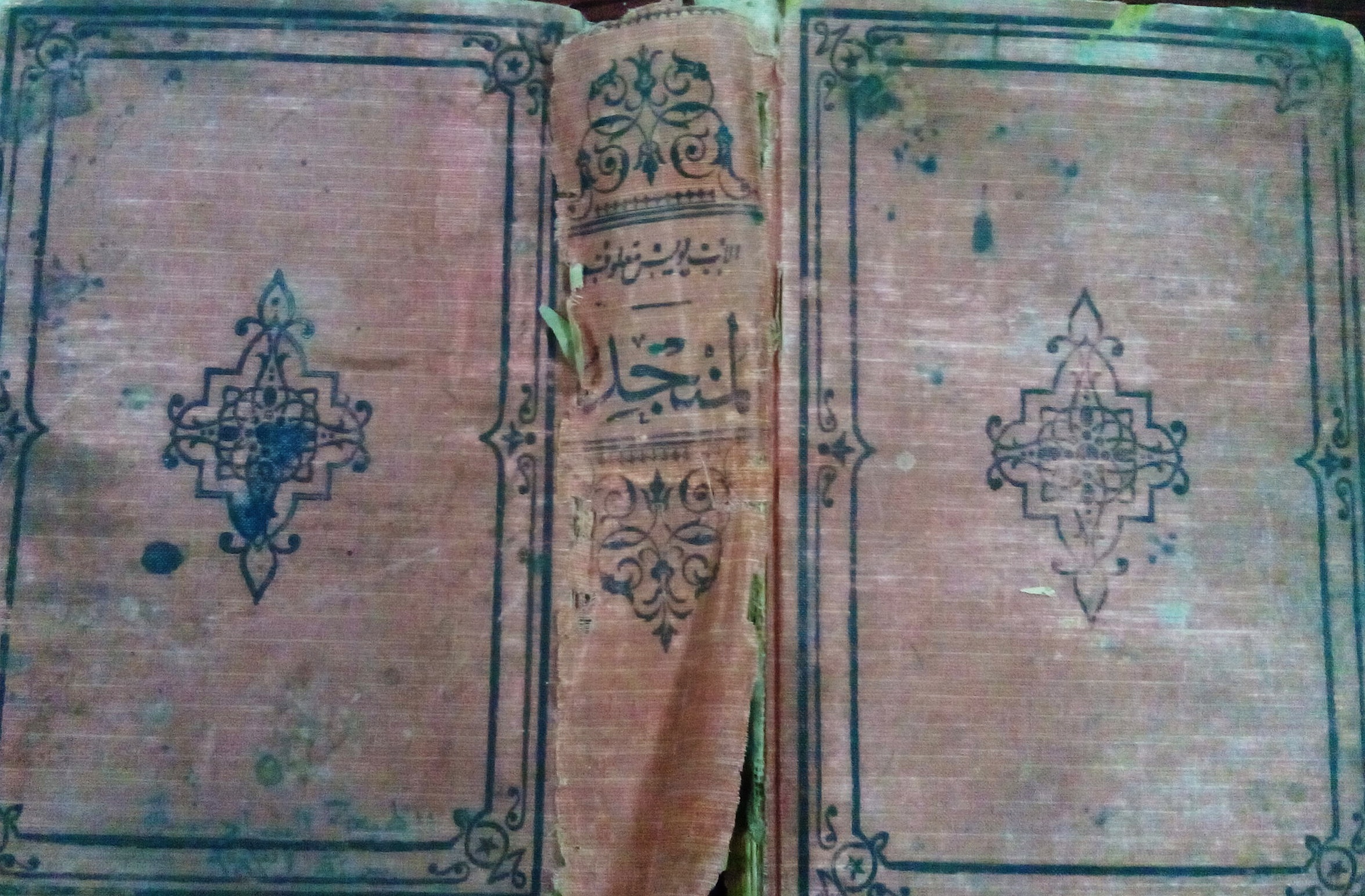 غلاف كتاب المنجد الطبعة السابعة بيروت لسنة 1931 وهو من تاليف الأب لويس معلوف